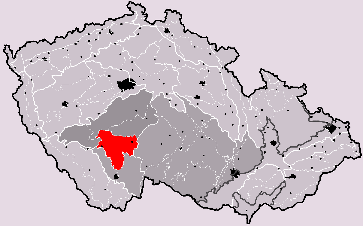 Poloha geomorfologického celku Táborská pahorkatina v rámci České republiky. Hercynský systém Hercynská pohoří I Česká vysočina I2 (II) Česko-moravská subprovincie I2A (IIA) Středočeská pahorkatina I2A-3 (IIA-3) Táborská pahorkatina